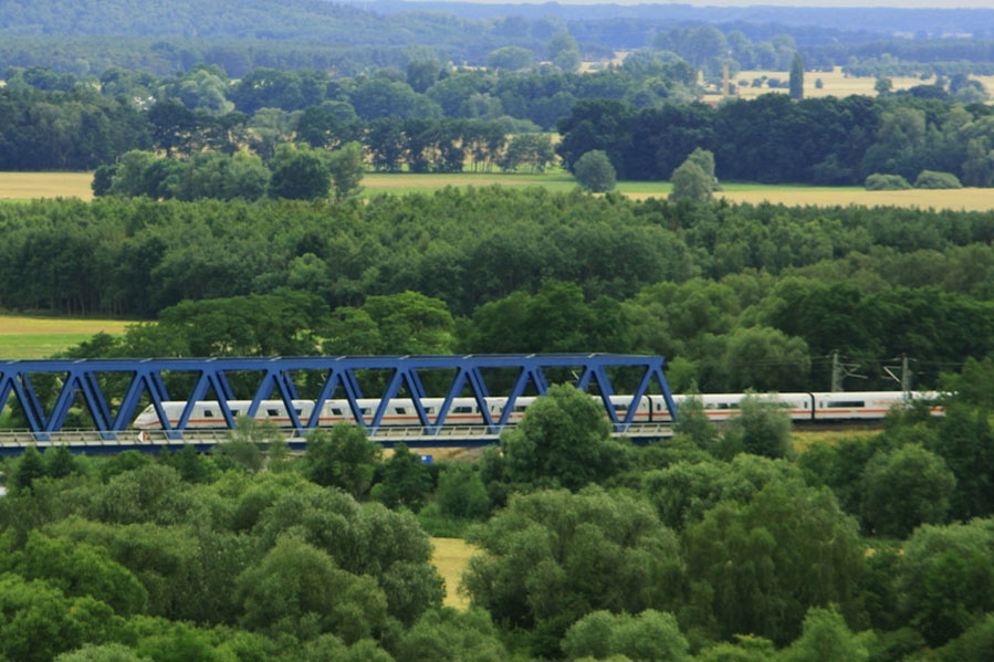 ICE Brücke in Rathenow